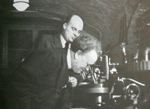 Herbert Grenzebach (hinten) mit Willem Mengelberg in der Berliner Singakademie vor 1939. Quelle: Die Schallplatten-Fibel Taschenbuch – 1939 von Telefunkenplatte (Hrsg.) (Autor)